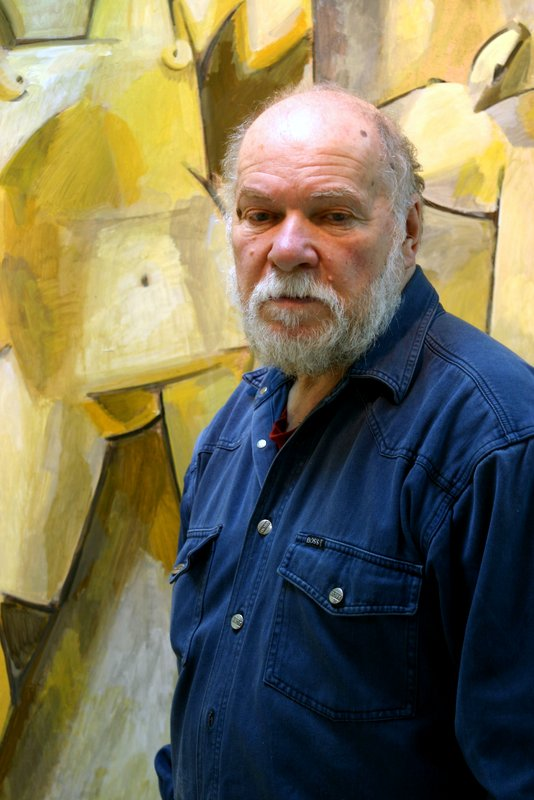 Художник Миша Брусиловский